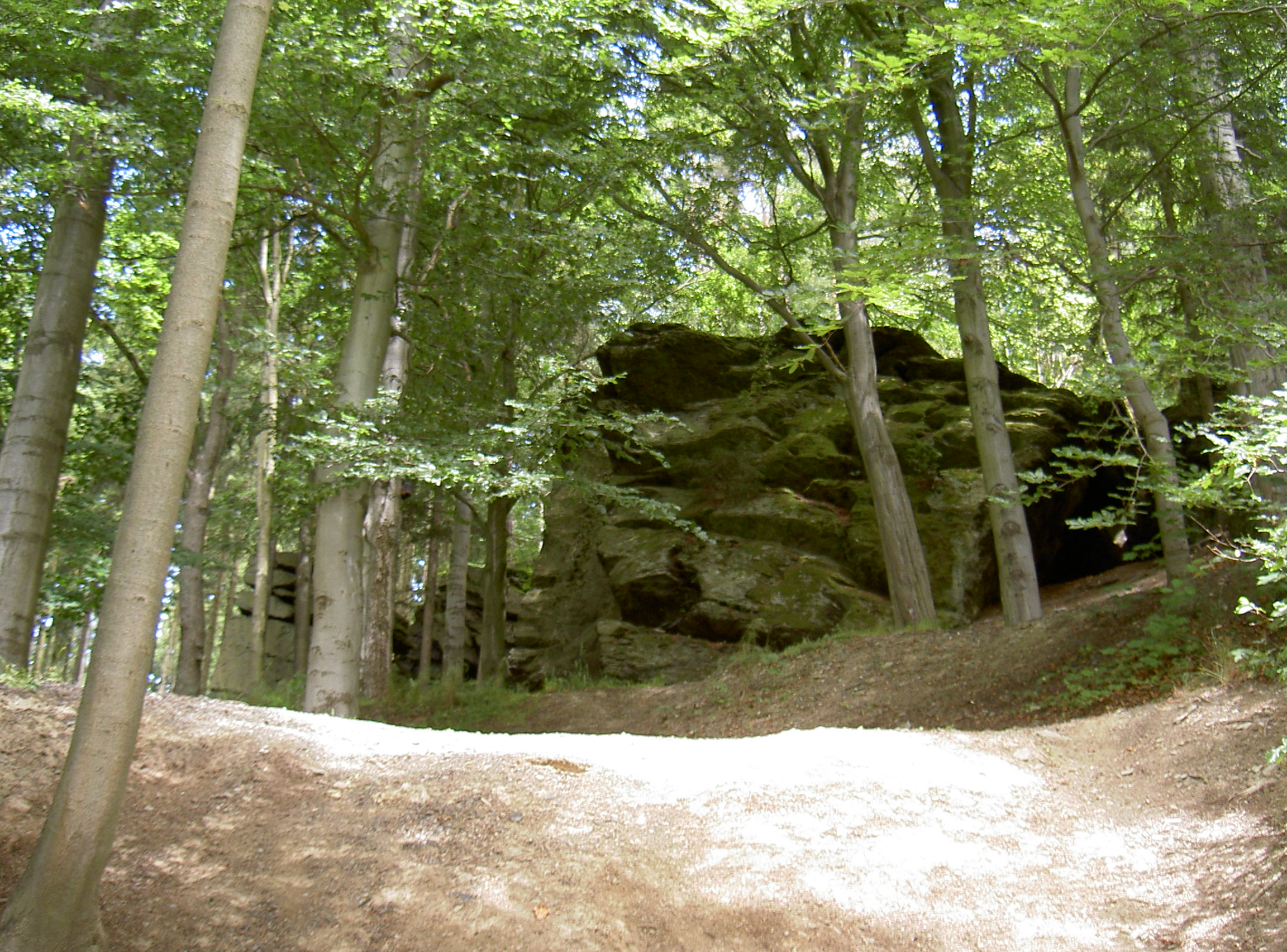 Felsen bei Fattigsmühle